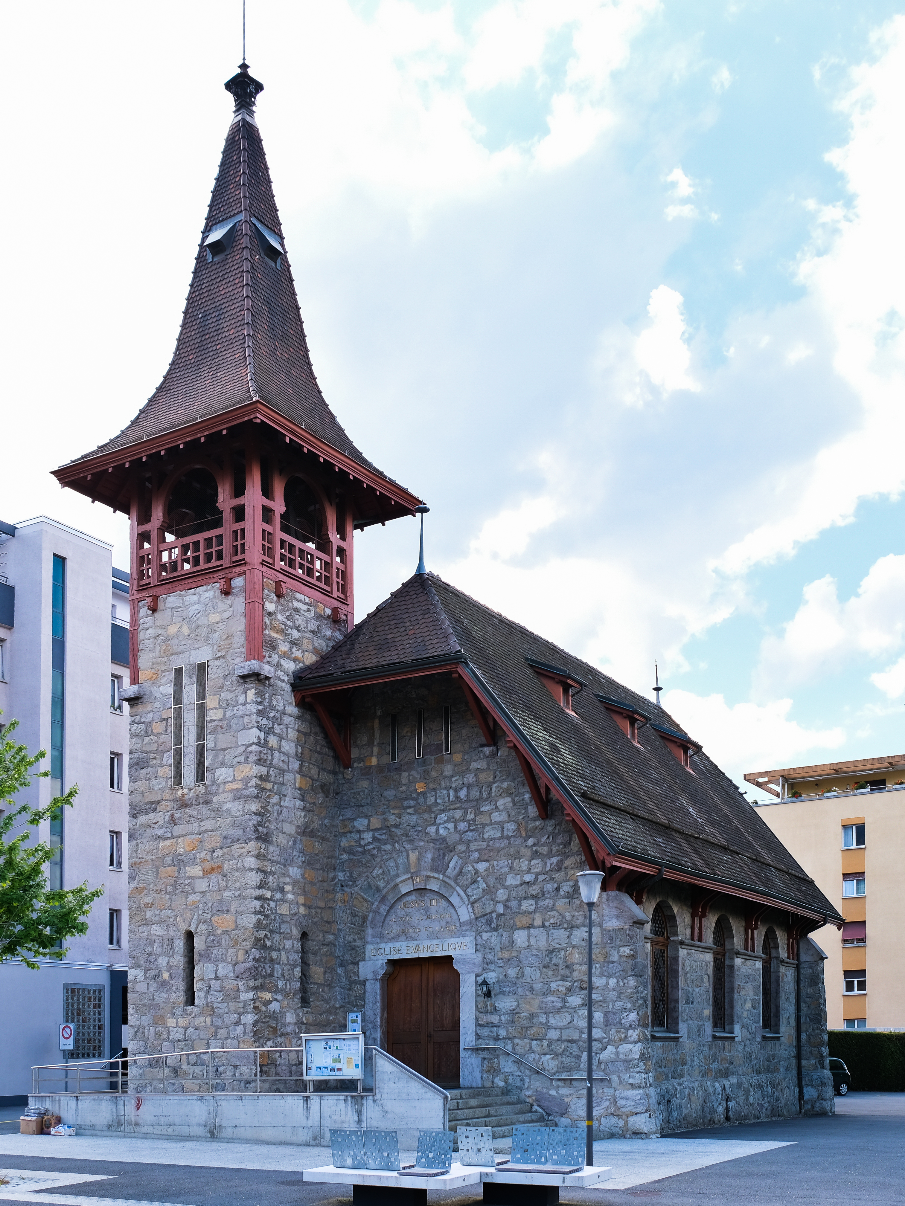 Le temple protestant de Monthey en 2020.